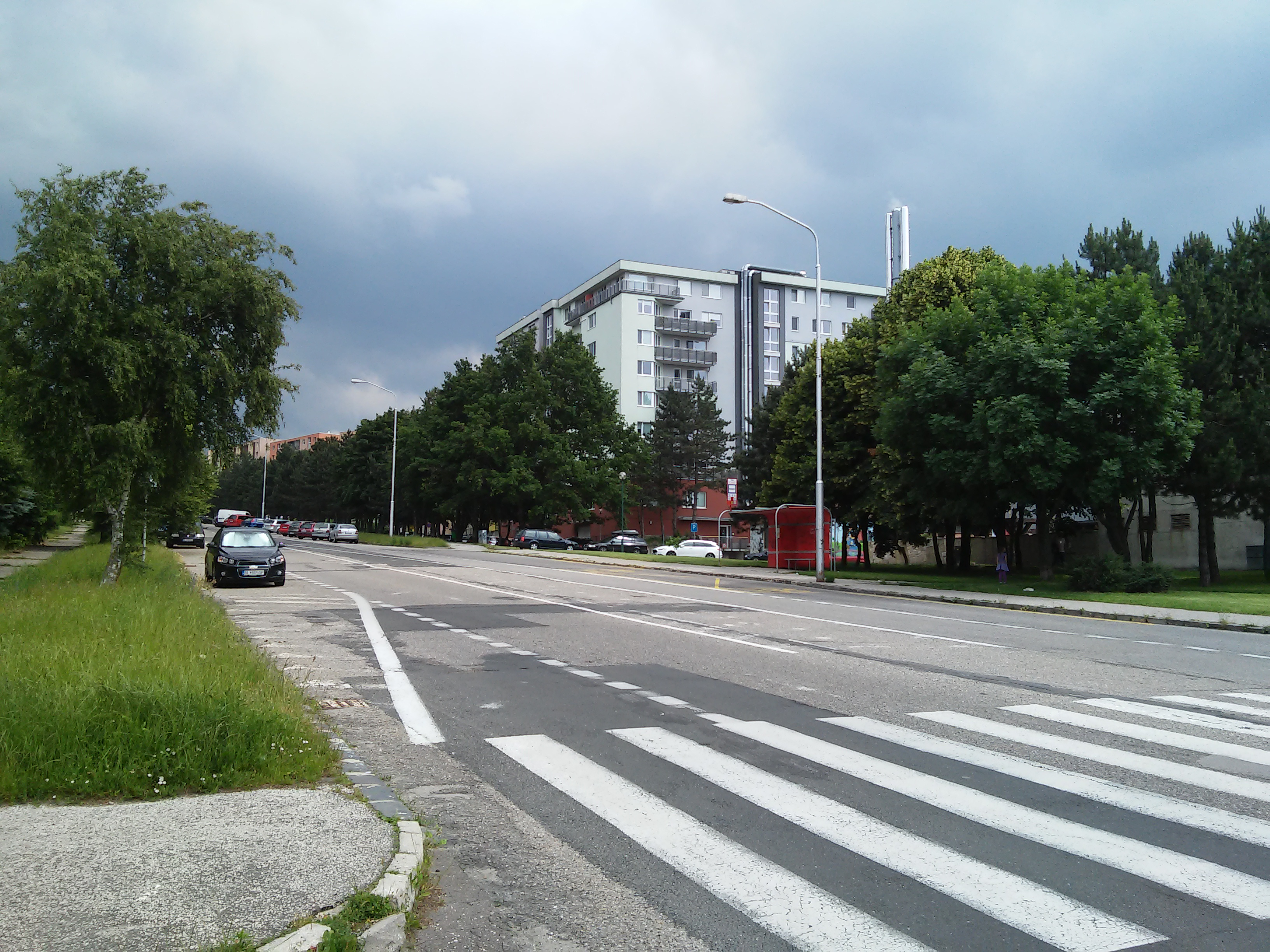 Podháj, Lamač, Bratislava